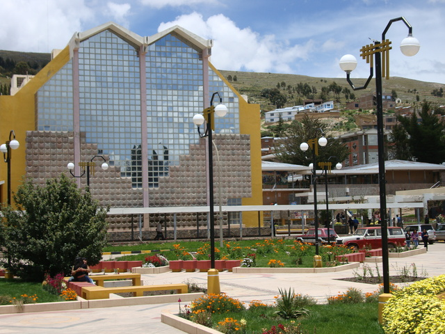 Fachada de la Biblioteca Central de la UNAP